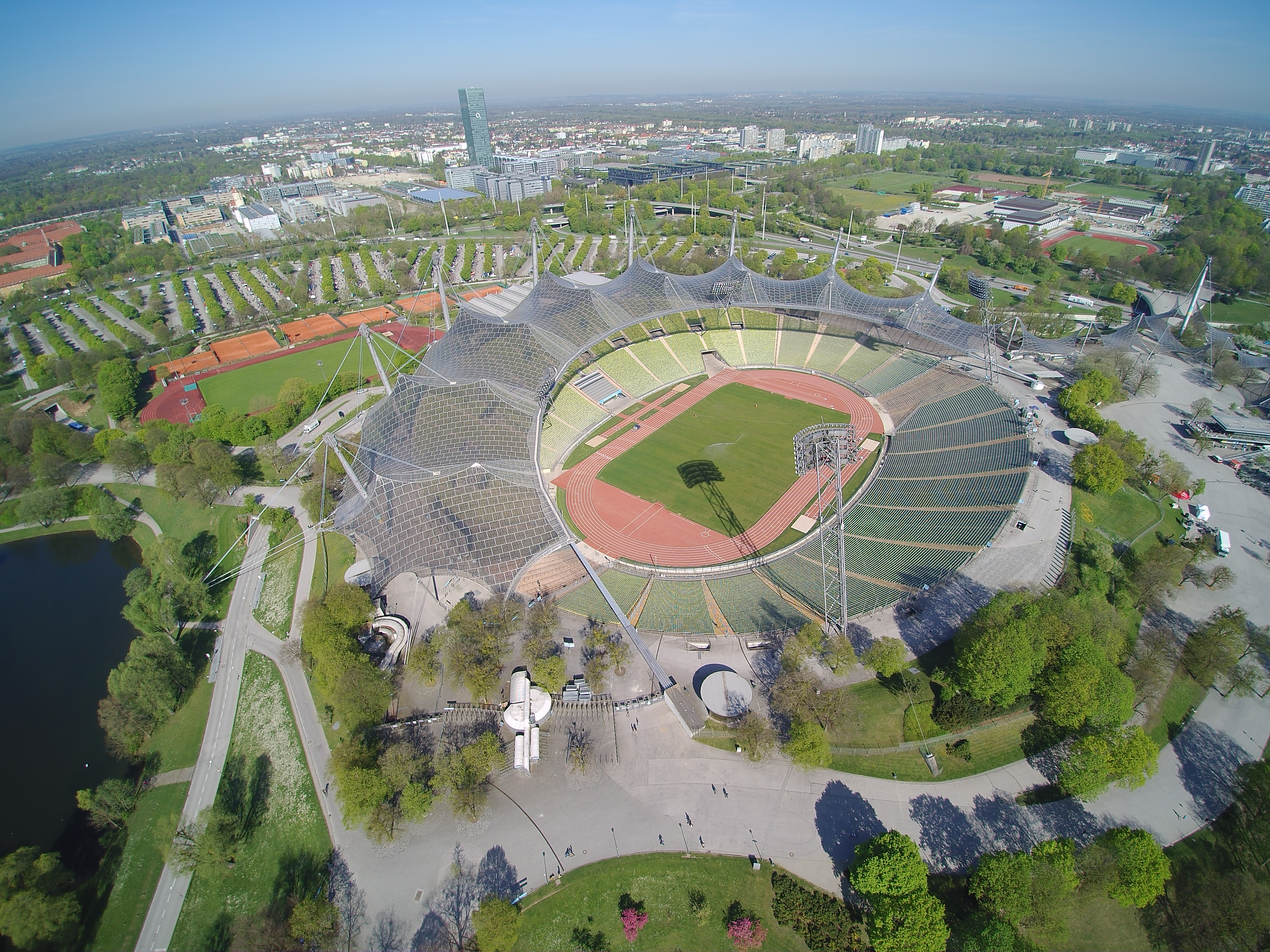 Diese Stadion ist unverwechselbar, einzigartig, ohnegleichen